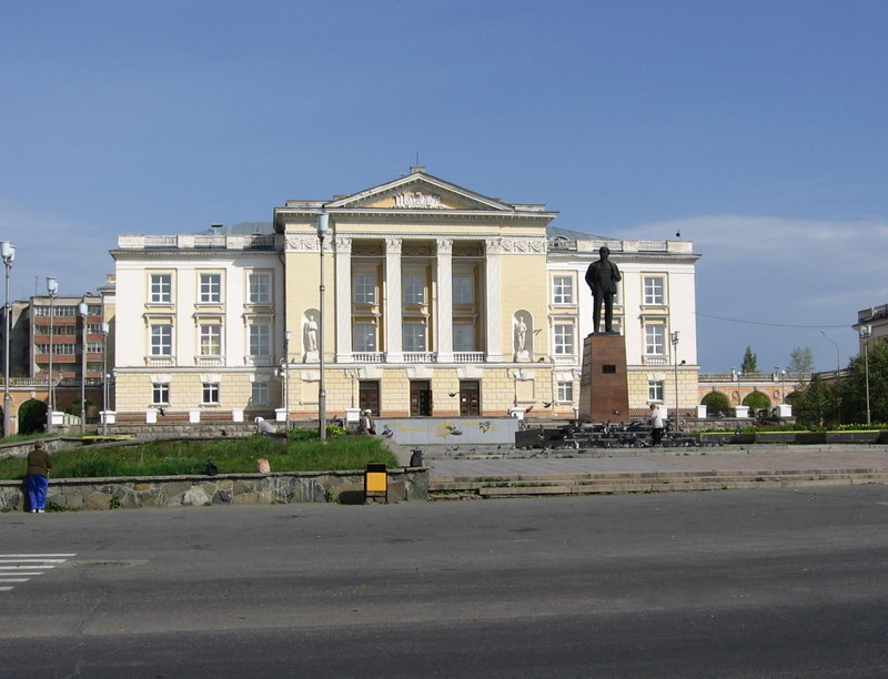 Мемориал участникам ВОВ и Вечный огонь в г. Лесном